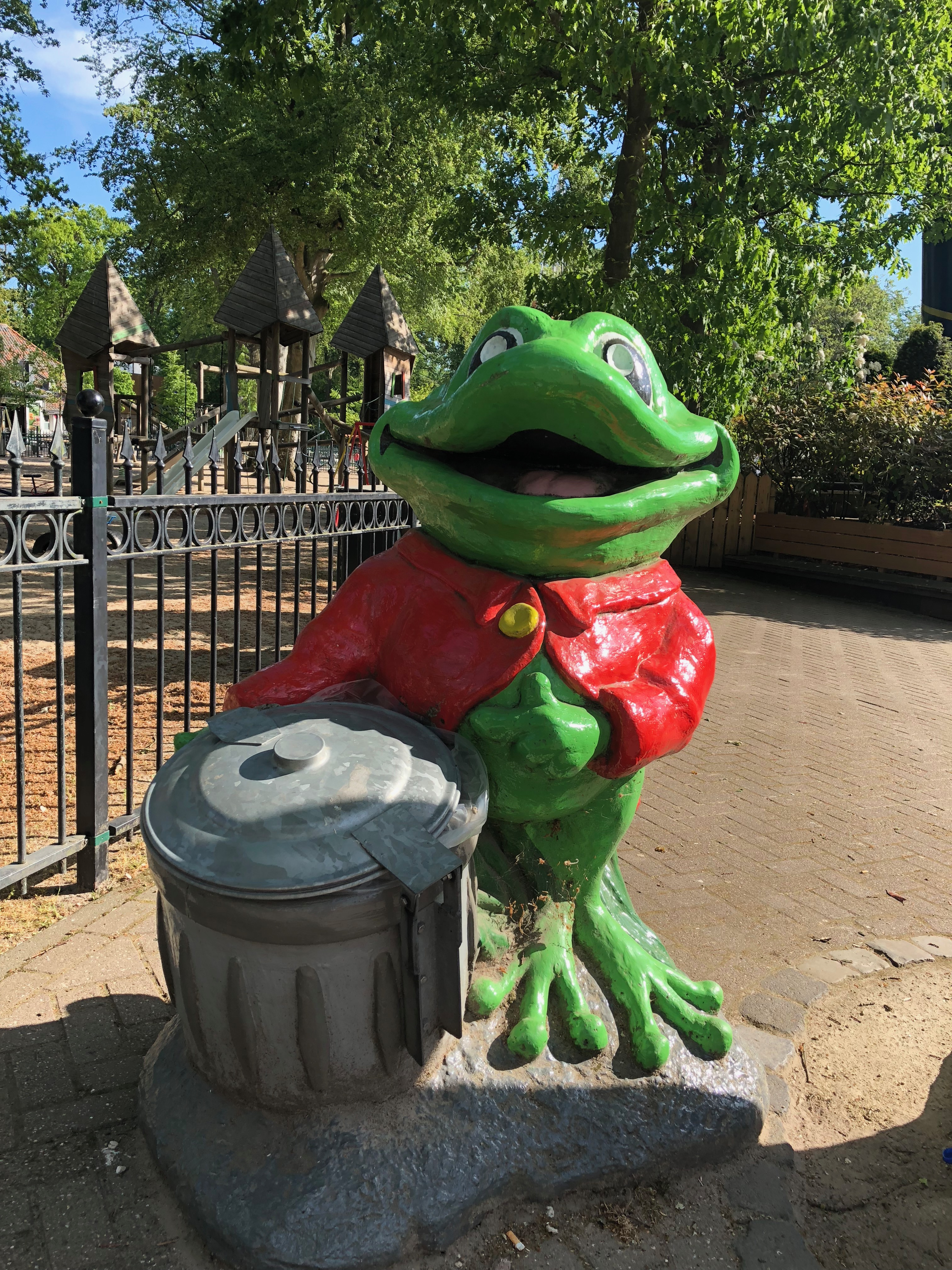 Duinrell